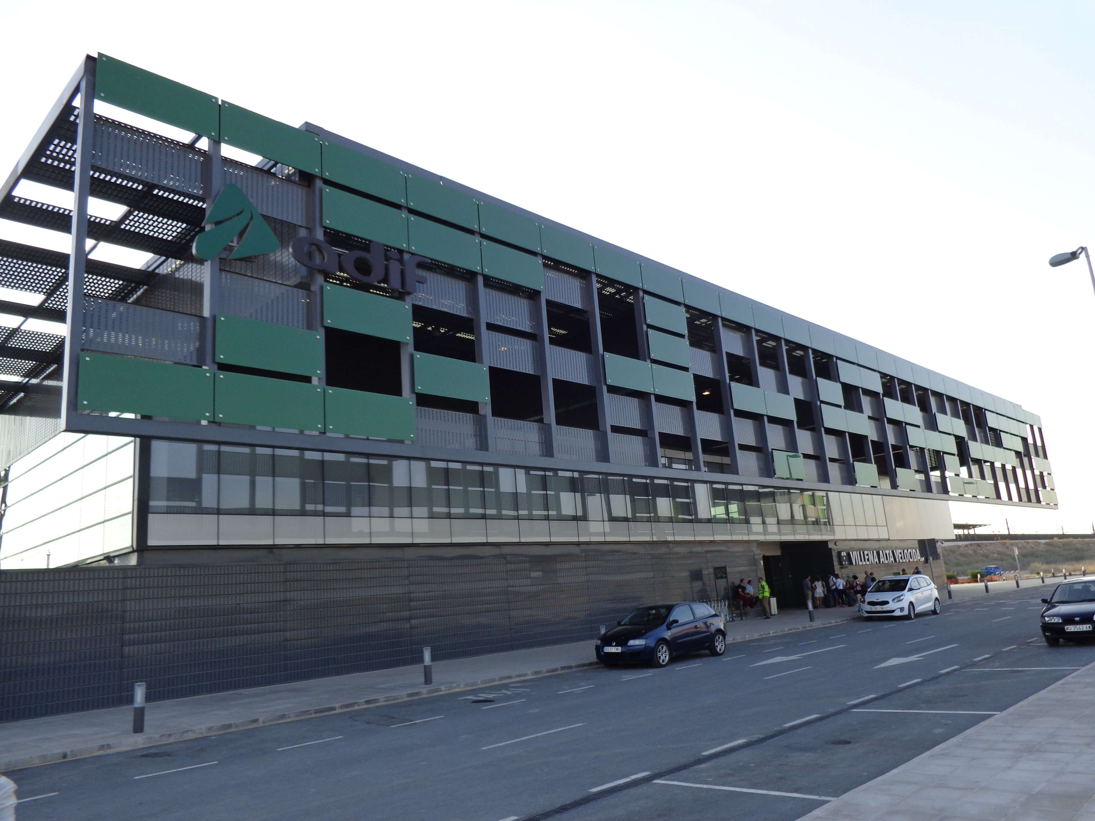 Stazione di Villena AVE